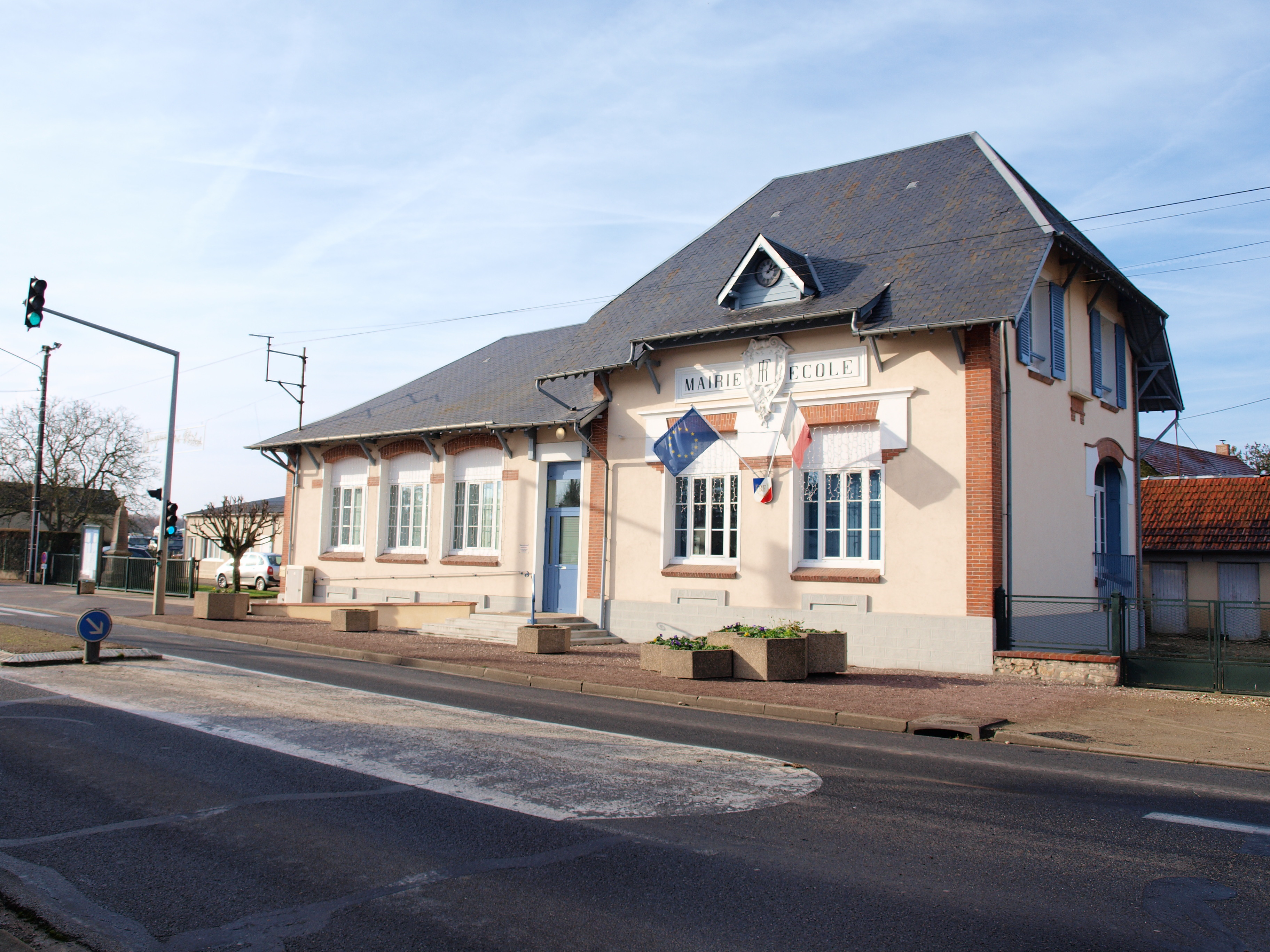 Solterre (Loiret, France) ; la commodité